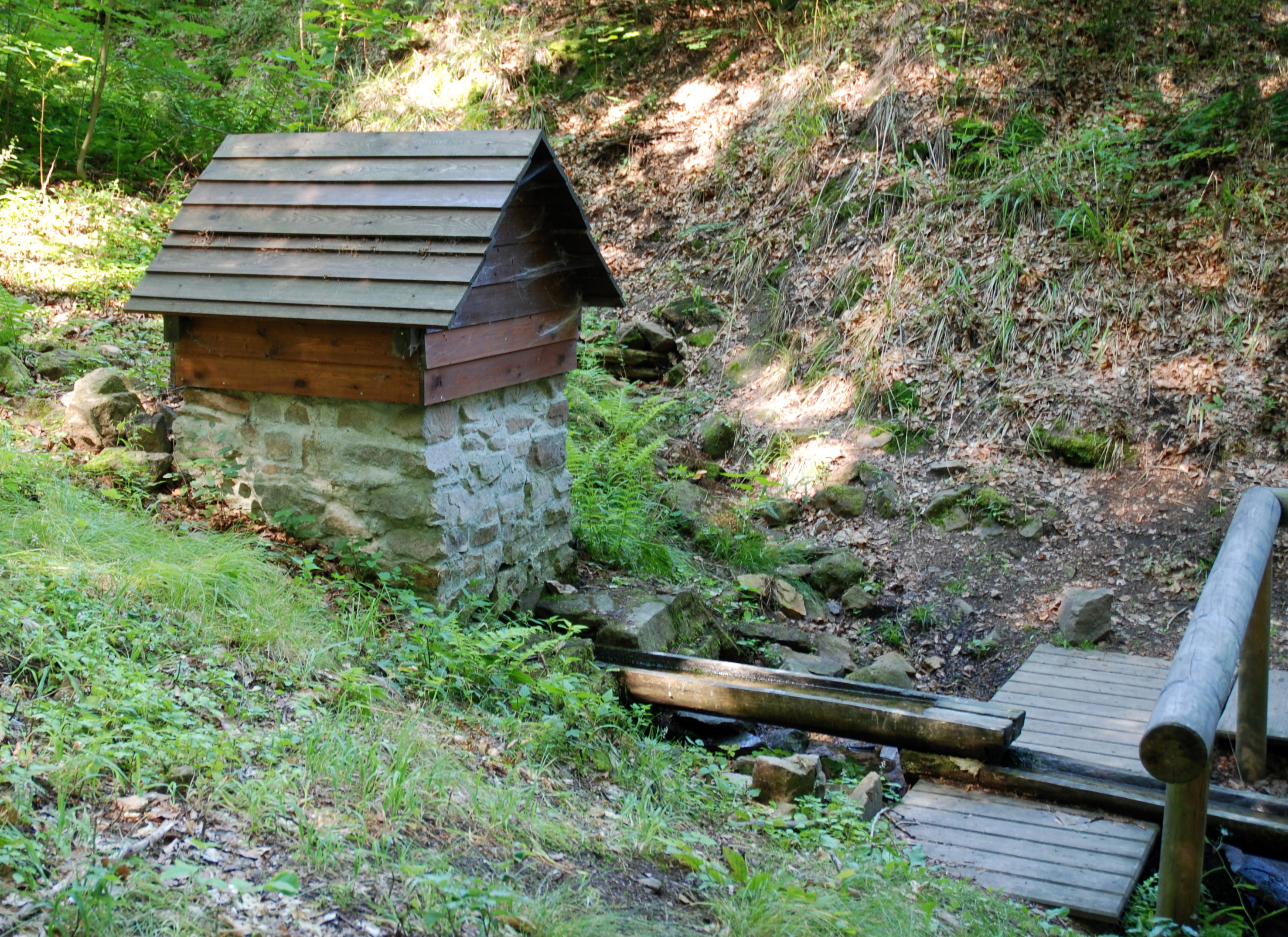 Vývěr vody na bezejmenné vodoteči v karlovarských lázeňských lesích v Drahovicích